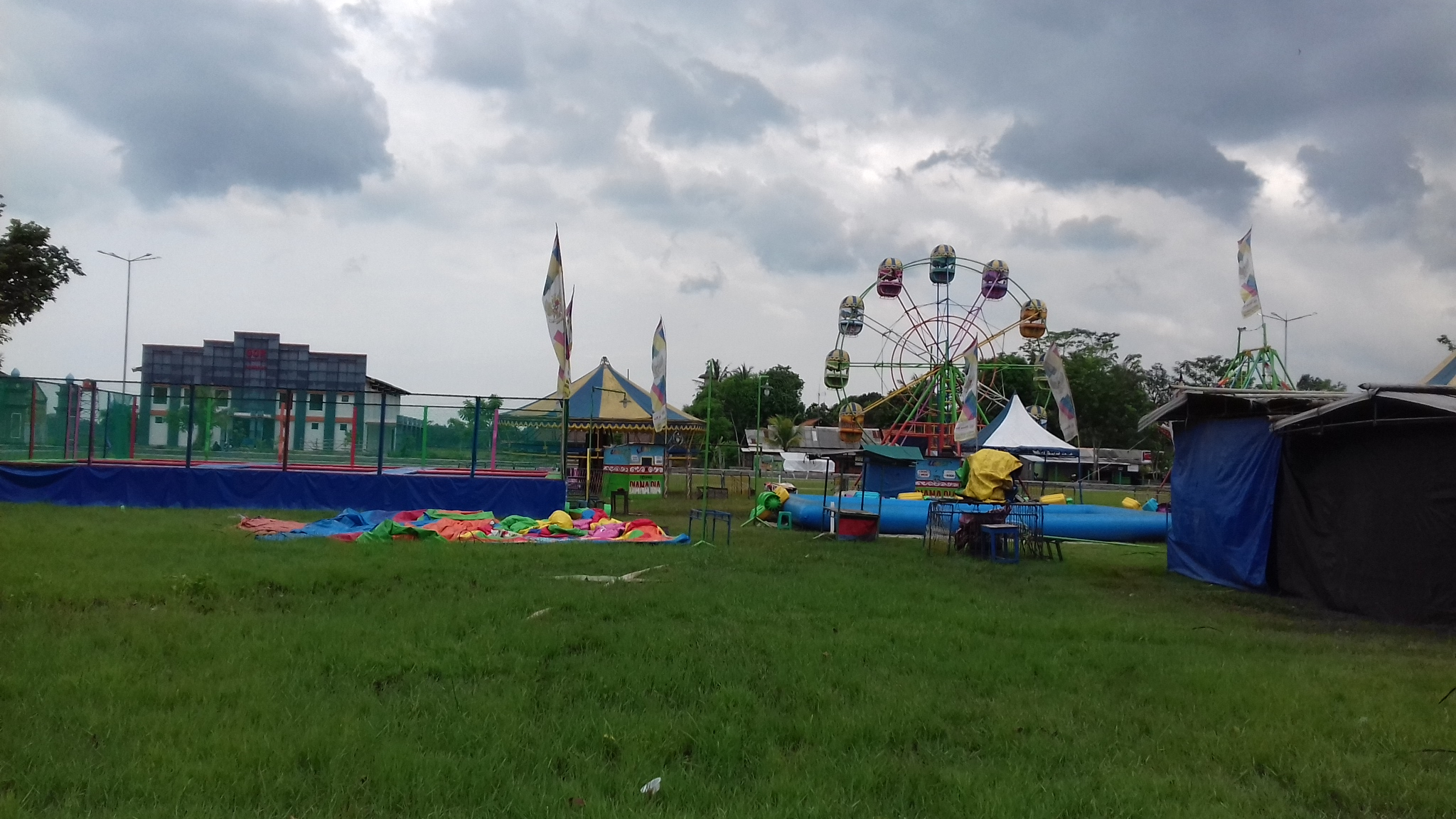 Jawa: Gambar iki yaiku swasana sore ing Lapangan Manunggal Gombong. Lapangan iki ana ing Gombong Kabupaten Kebumen. Lapangan Manunggal iku lagi ana pasar wengi.